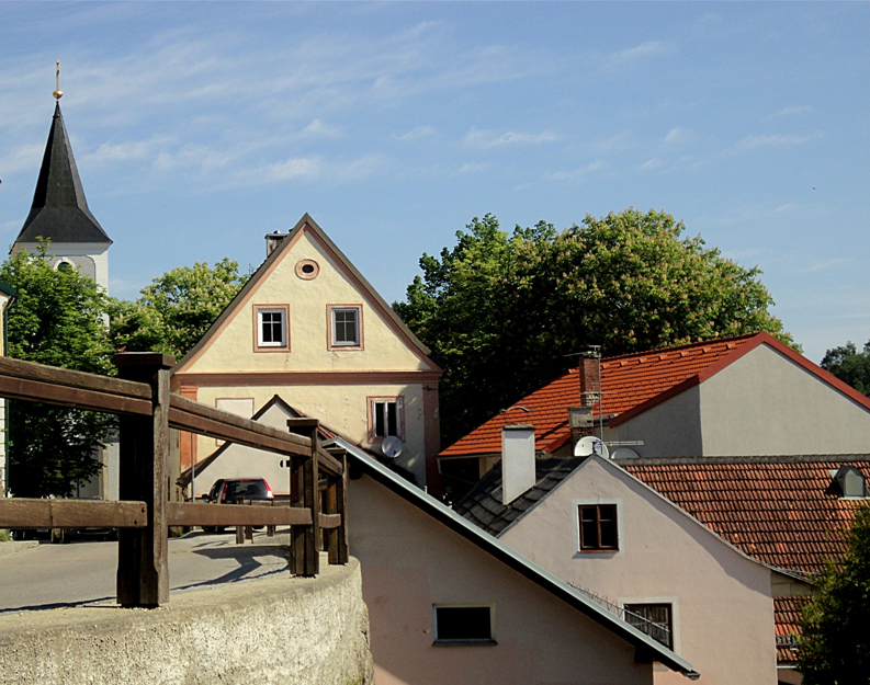 Zentrum von Langschlag mit der Kirche Center of Langschlag with the church